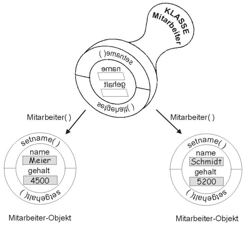 Klasse erstellt Objekt. Am Beispiel der Mitarbeiter.